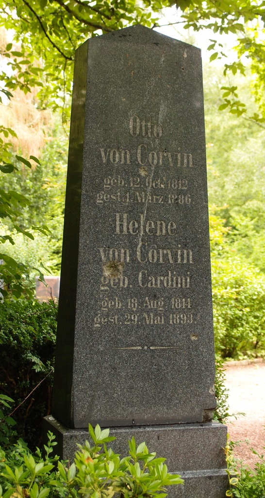 Grab des Schriftstellers Otto von Corvin (1812-1886) auf dem Nordfriedhof in Wiesbaden